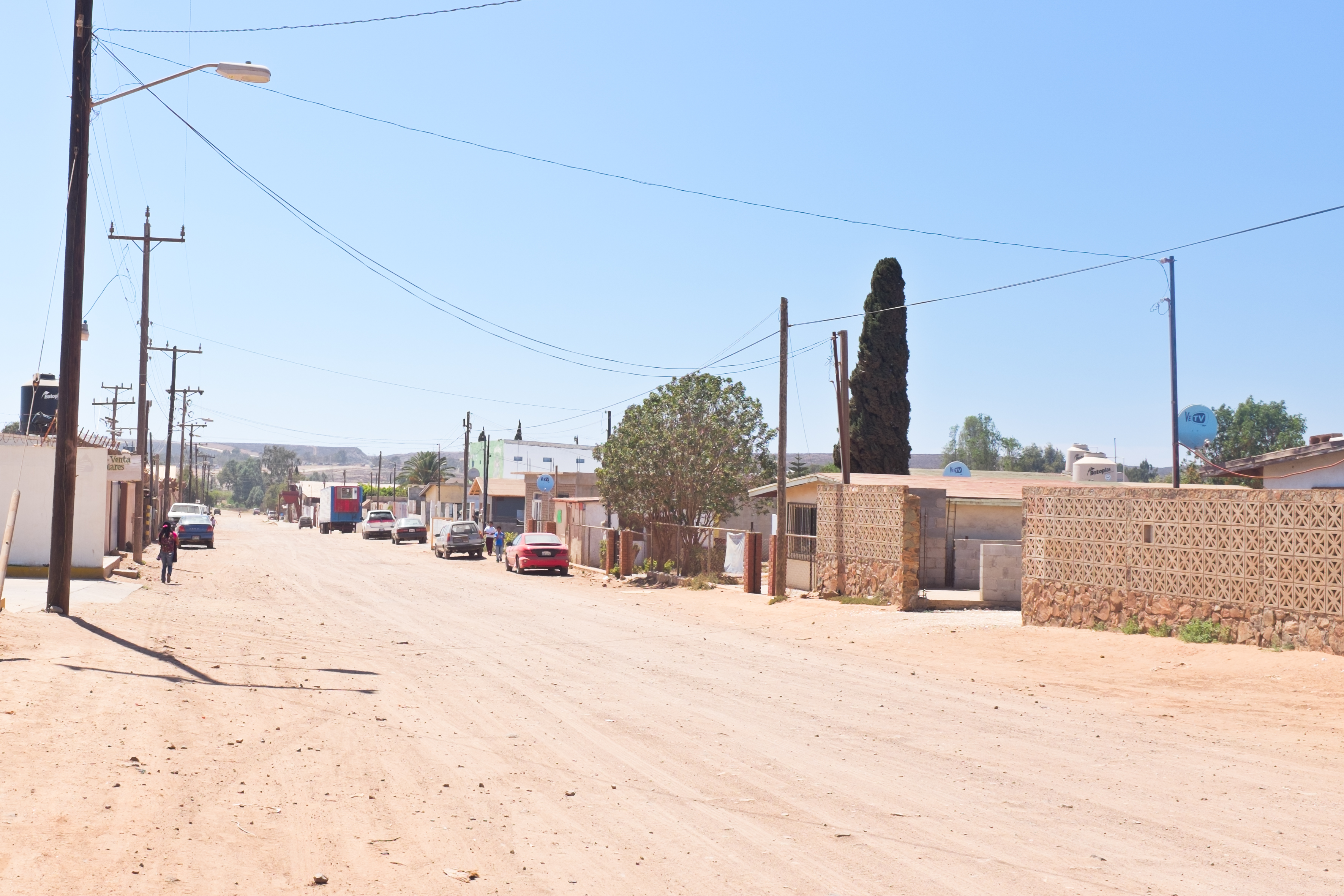 Camalú, Baja California, México